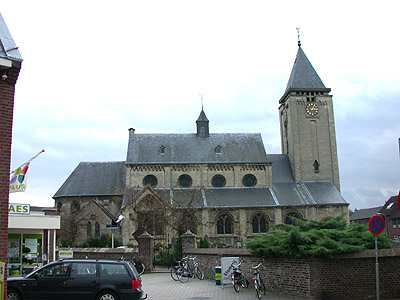 Kerk St. Joannes de Doper te Nieuwstadt